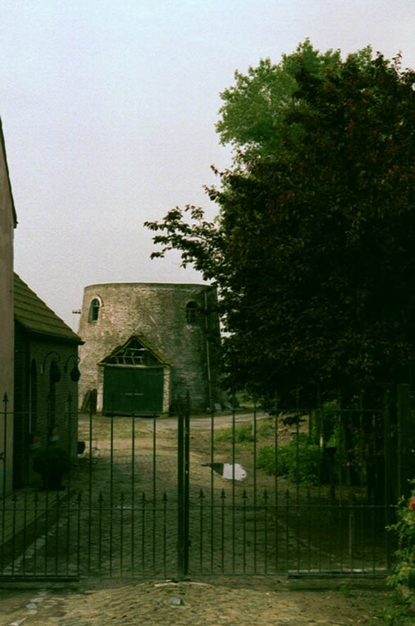 Sint-Laureins Sint-Margrietestraat 25